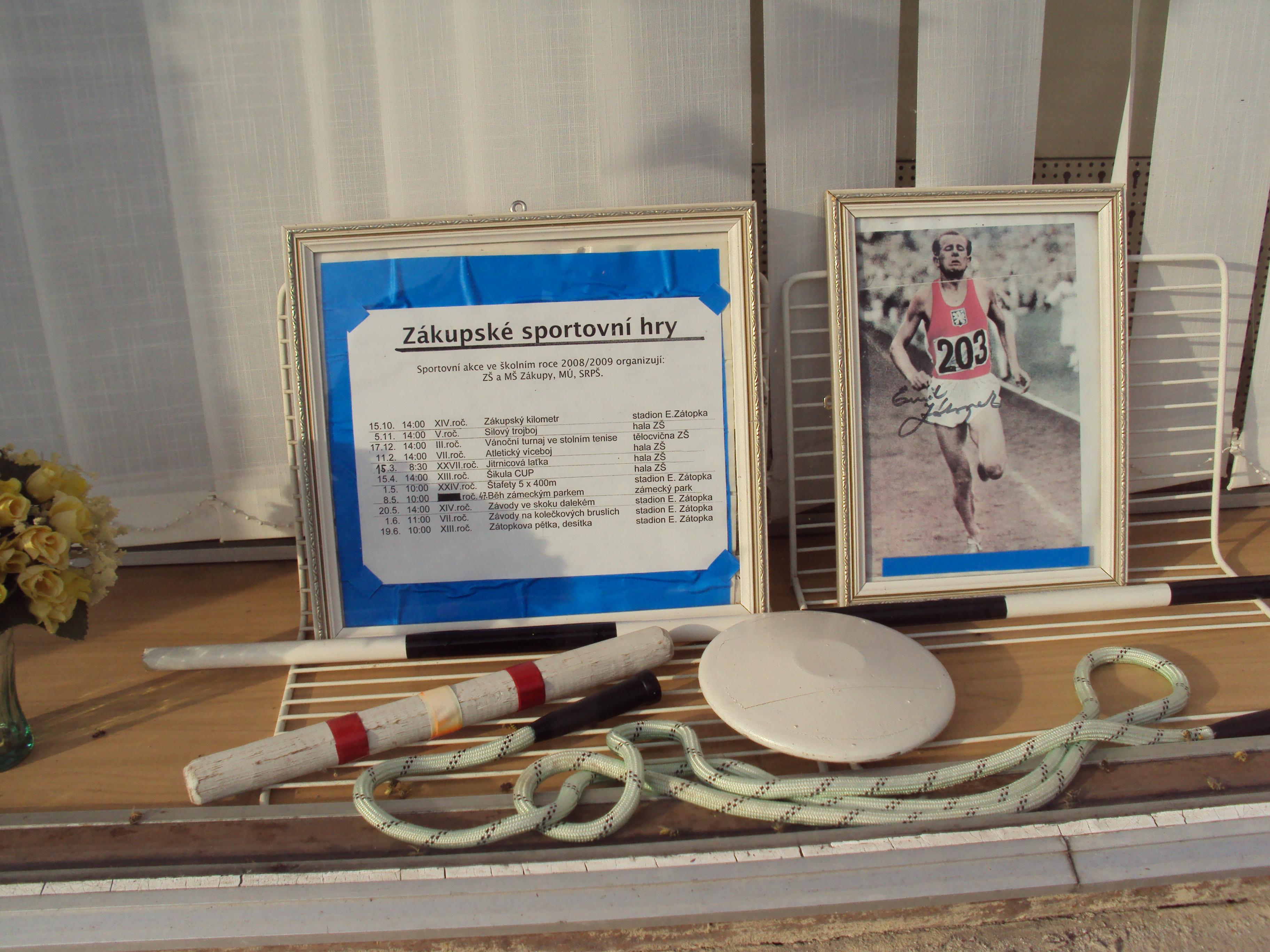 Propagační výloha Zákupských sportovních her je u náměstí